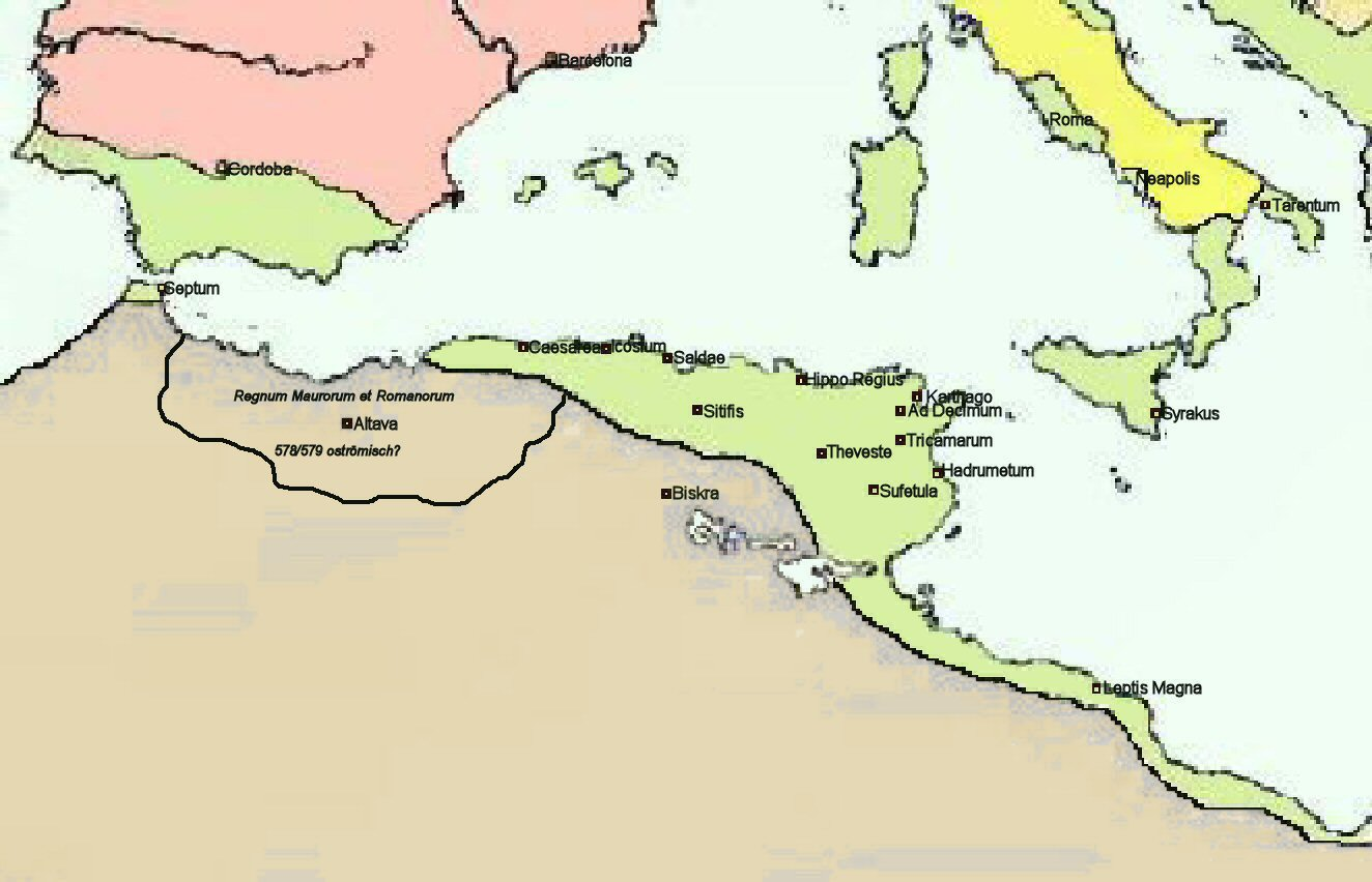 Diese Karte gibt einen Überblick über das oströmische Nordafrika von 533-698